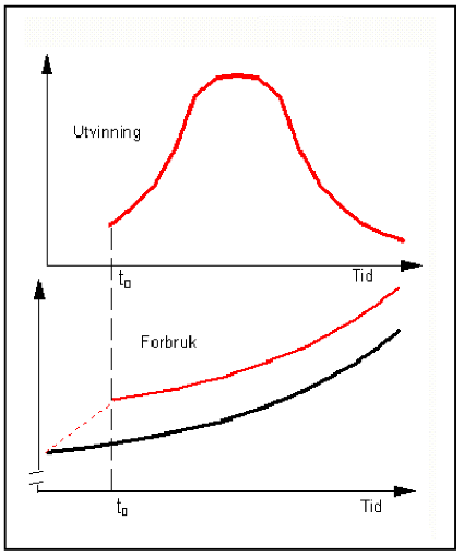 Handlingsregelen